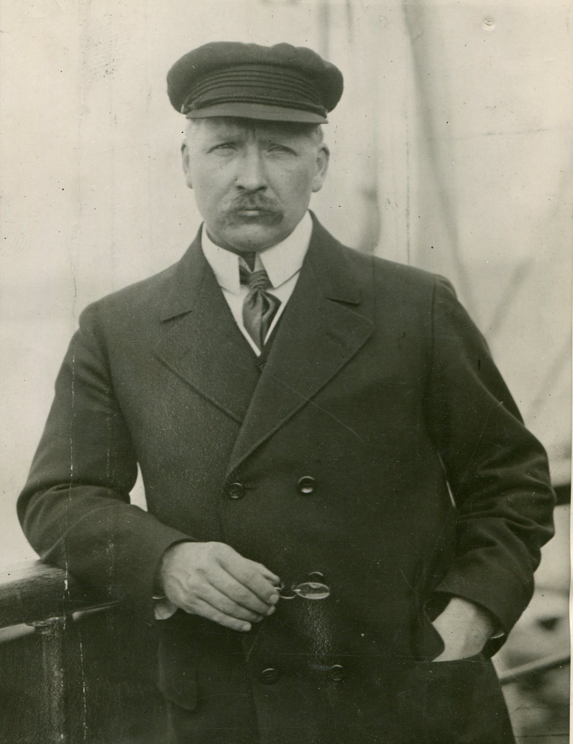 Albert Suedekum as Prussian Minister of Finance in Sakrow near Berlin (1919)